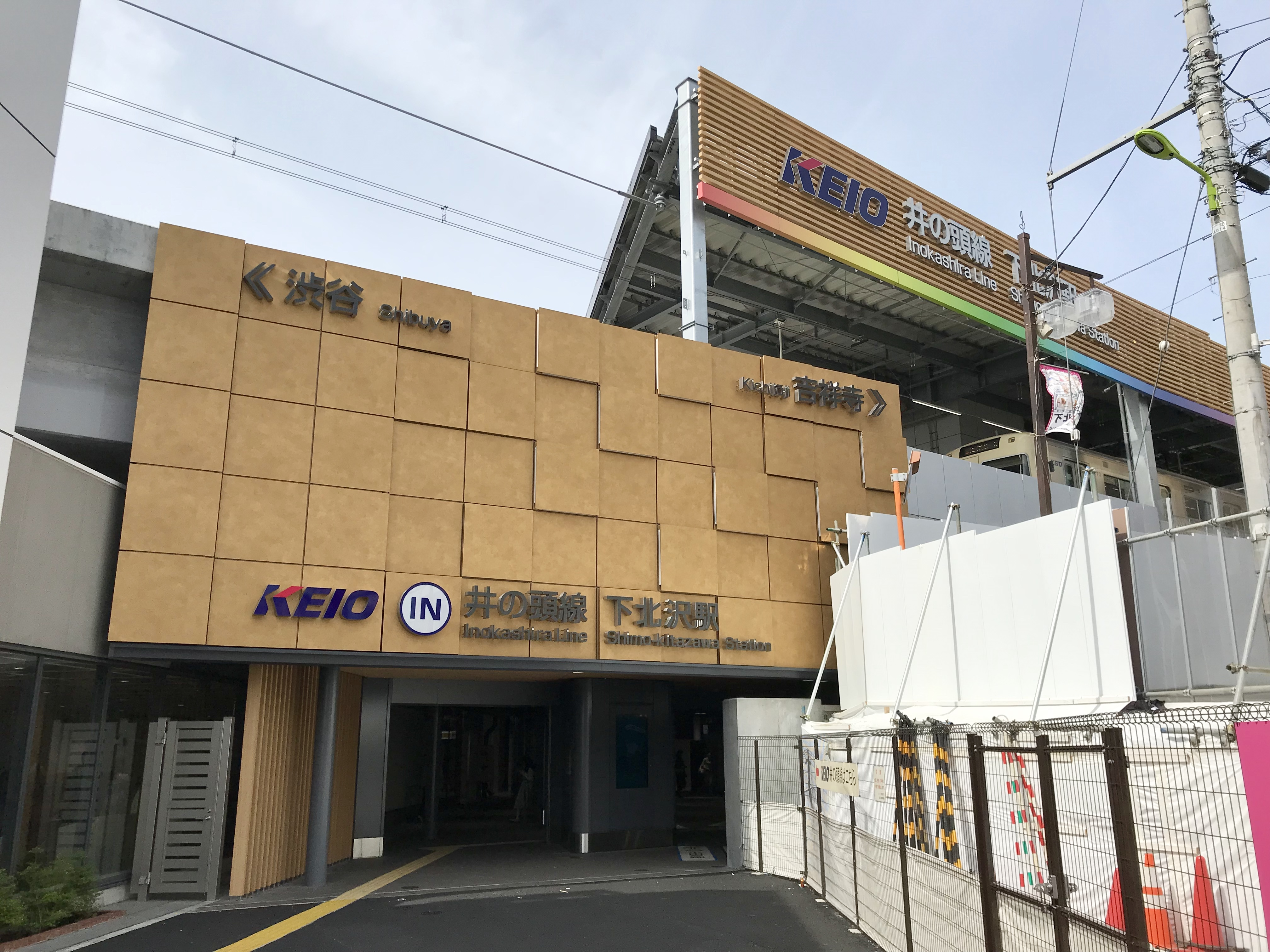 京王井の頭線下北沢駅駅舎